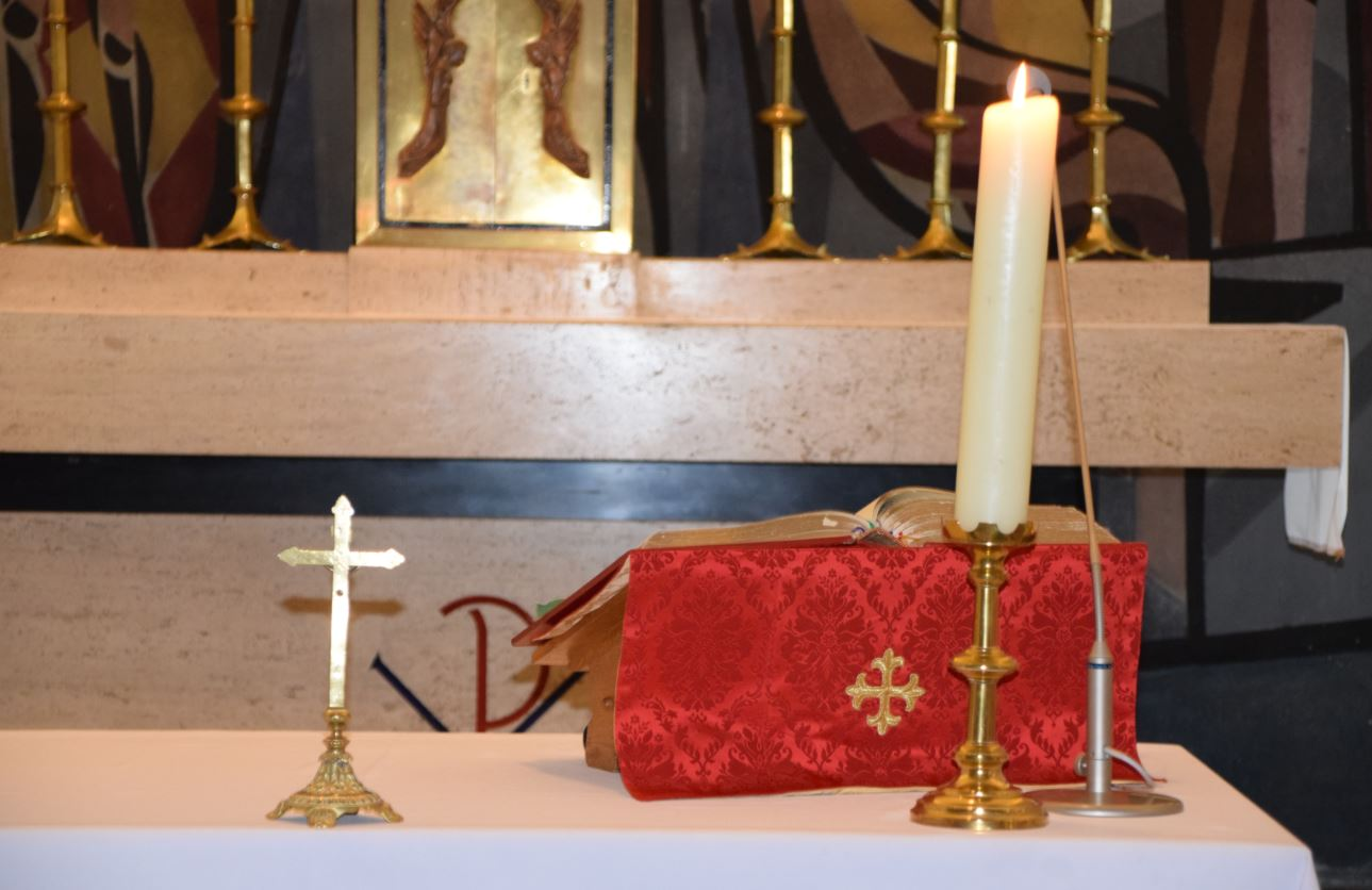 Velum i rødt på alter i St. Franciskus Xaverius kirke